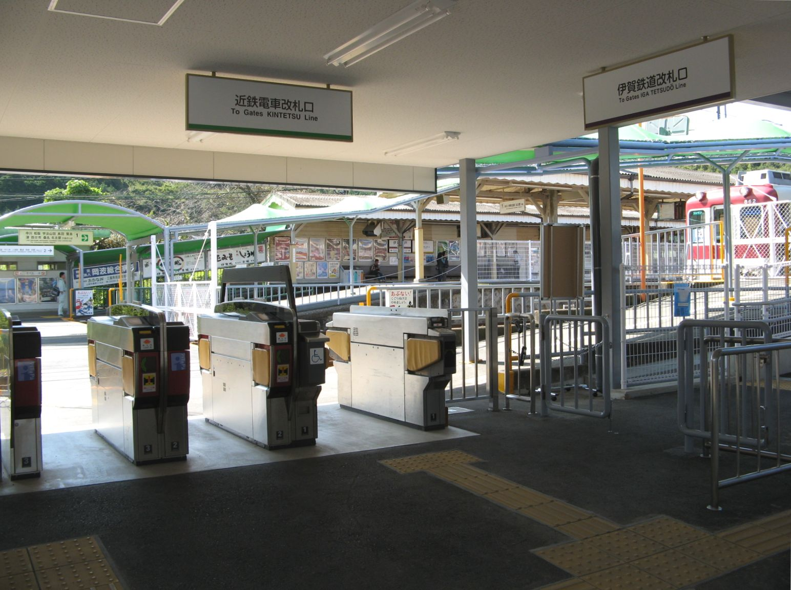 伊賀神戸駅 近鉄（正面）と伊賀鉄道（右）で分けられた改札